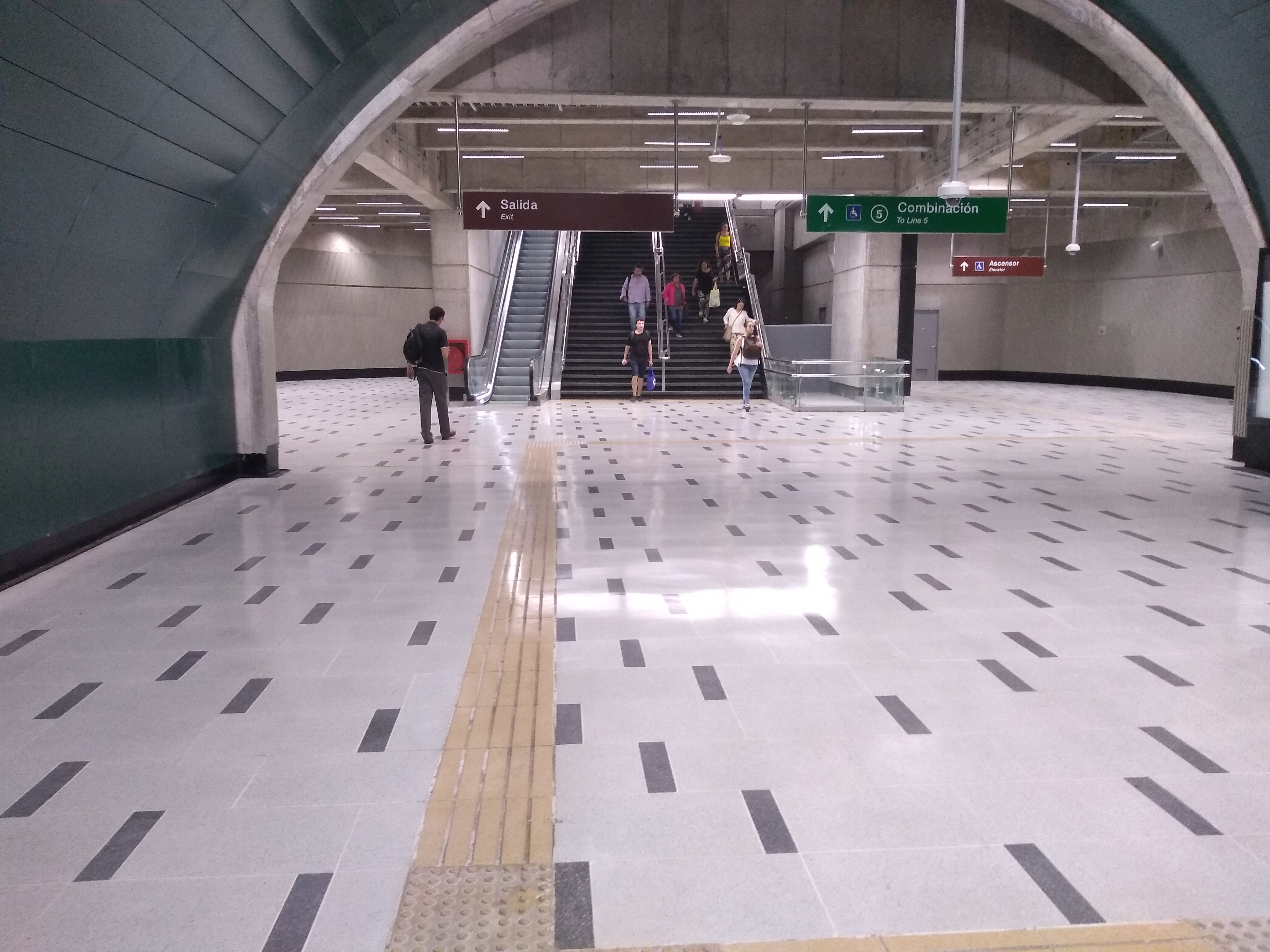 Nivel de combinación entre Lineas 3 y 5